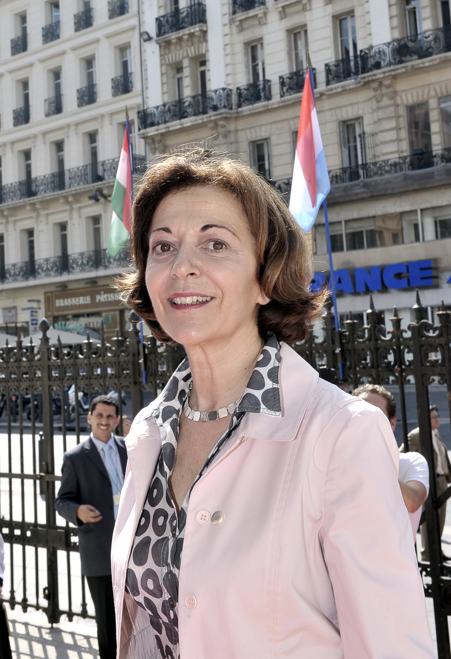 Anne-Marie Idrac, secrétaire d'État chargée du commerce extérieur, lors de la 7ème conférence EUROMED du Commerce extérieur à Marseille